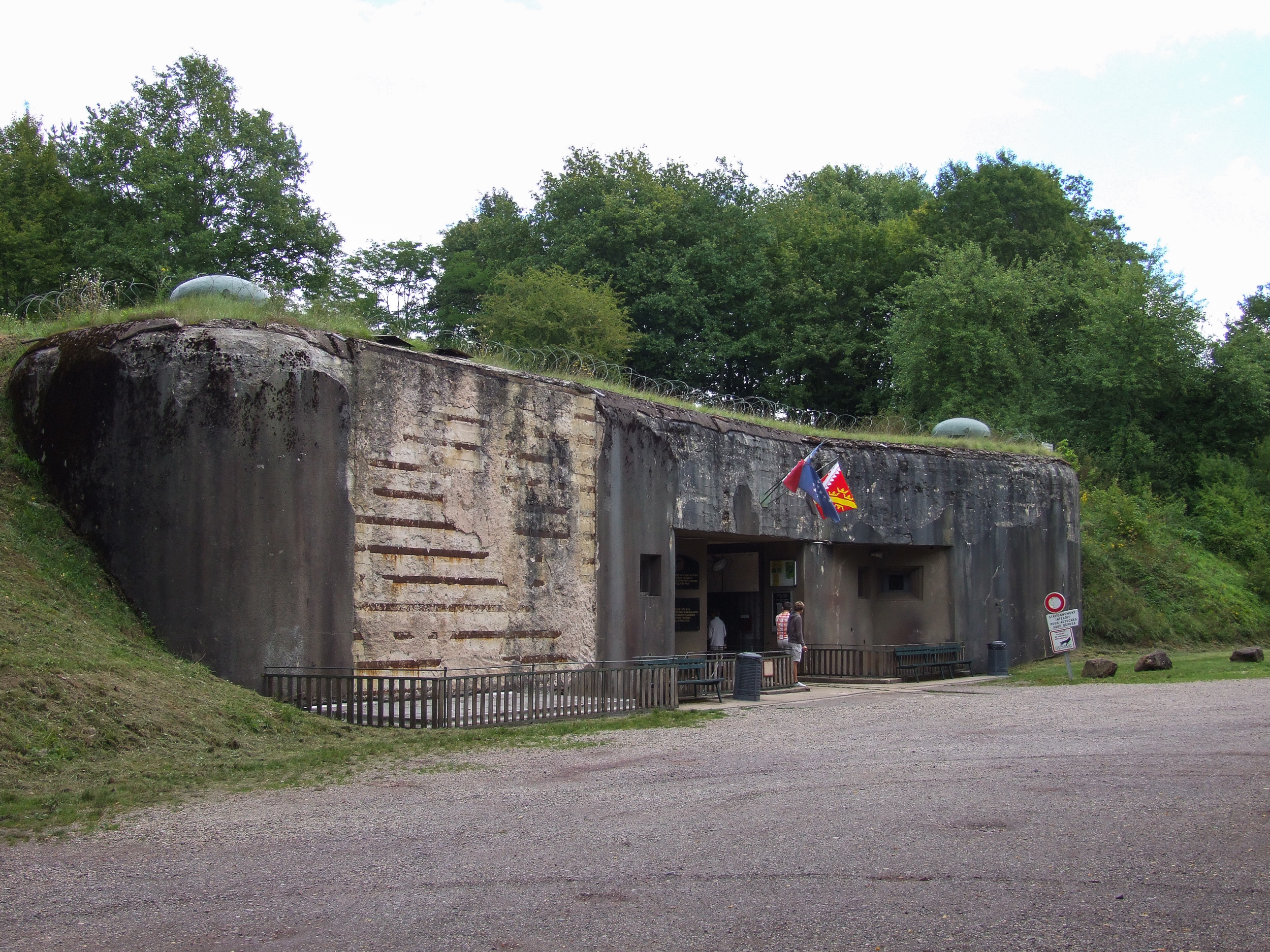 Eingang zur Ouvrage Four à Chaux der Ligne Maginot bei Lembach, Elsass, Frankreich.